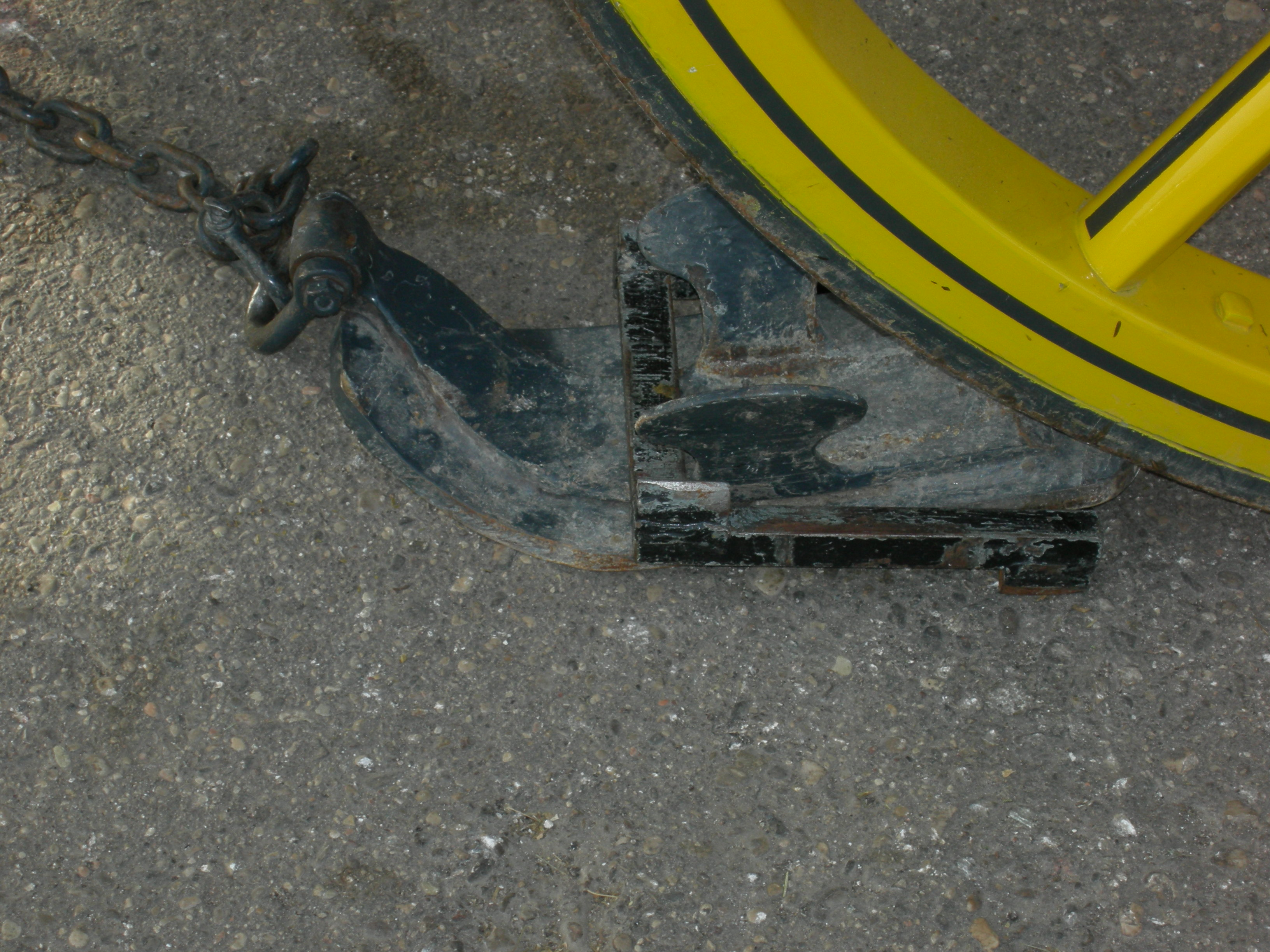 Vorgelegter Hemmschuh mit eingespannten Eiskratzer zum Bremsen auf verschneiten oder vereisten Wegen vor dem rechten Hinterrad einer Postkutsche